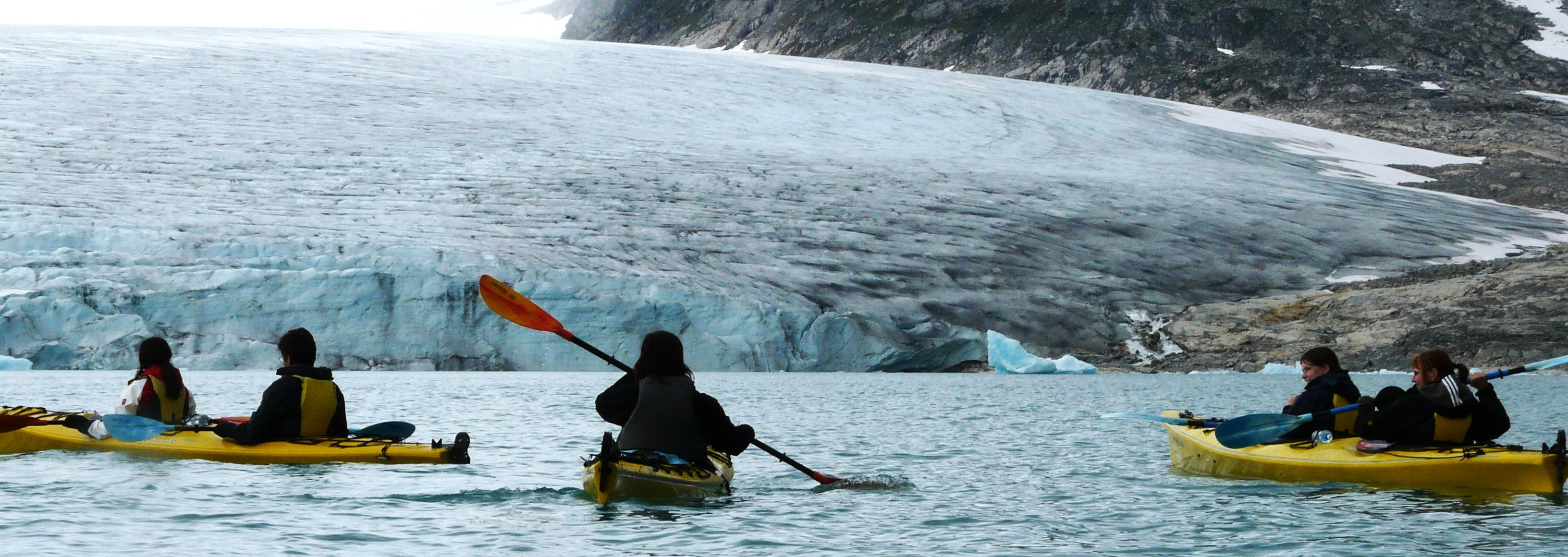 Styggevatnet